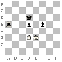 Les blancs jouent et font nulle. Une étude d'échecs de E. Del Rio. Image faite par User:Mlavaud avec MS Paint.